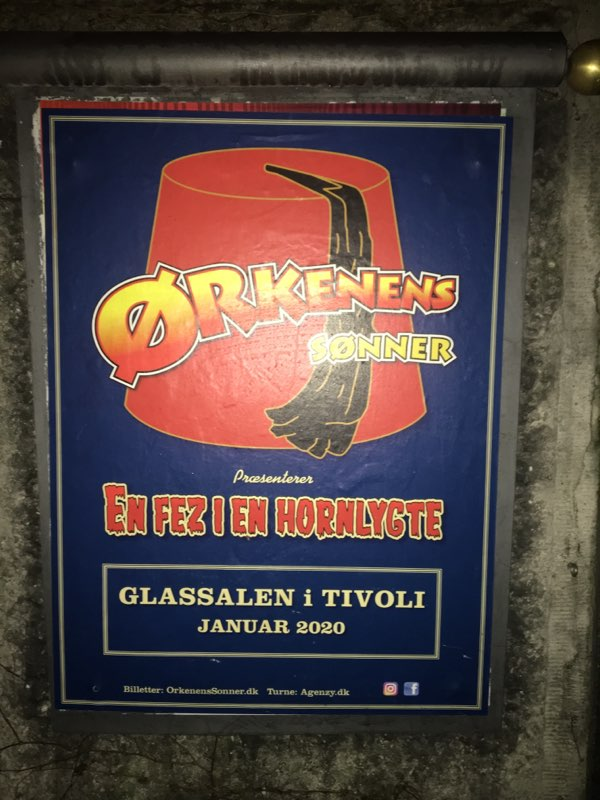 Ørkenens Sønners show En Fez i en Hornlygte i Glassalen i Tivoloi med premiere i januar 2020. Plakat på ydersiden af Tivoli.